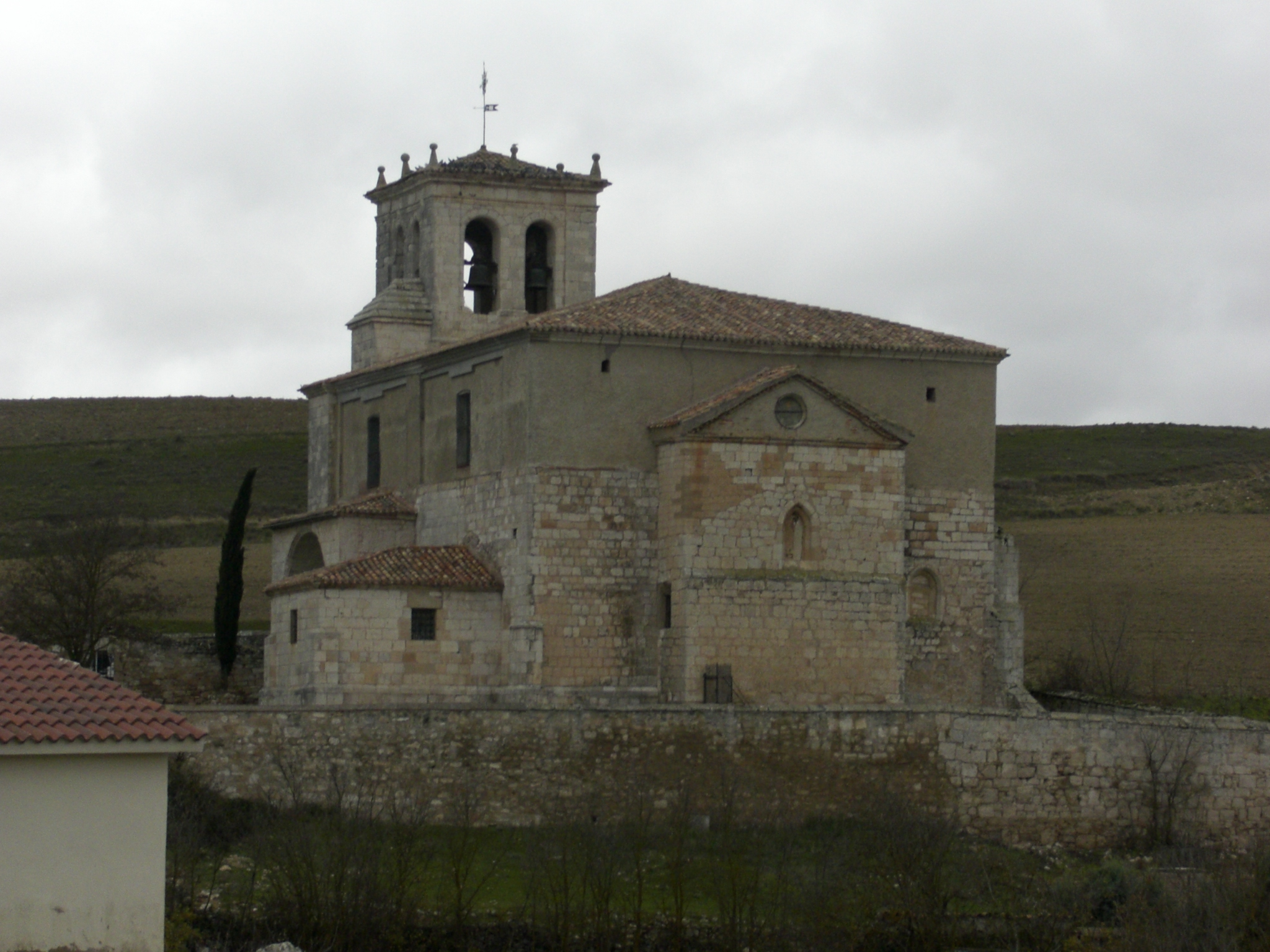 Iglesia de Frandovinez, Provincia de Burgos